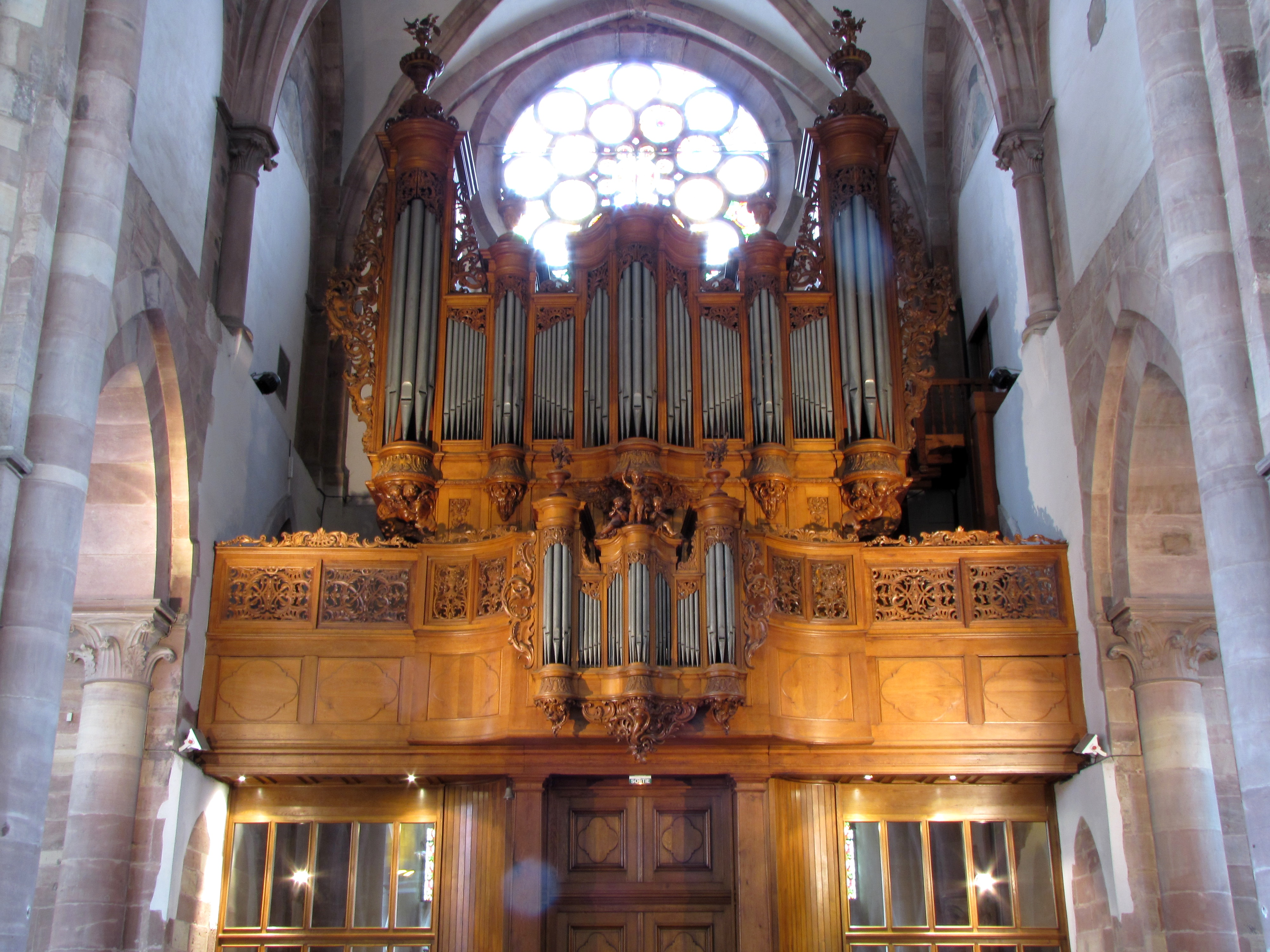 Alsace, Bas-Rhin, Église protestante Saint-Thomas de Strasbourg, 4 rue Martin-Luther (PA00085032).Orgue et garde-corps Jean-André Silbermann (1740): This object is classé Monument Historique in the base Palissy, database of the French furniture patrimony of the French ministry of culture, under the references PM67000347, buffet+garde-corps PM67000348 buffet+garde-corps and instrument PM67000969 instrument.